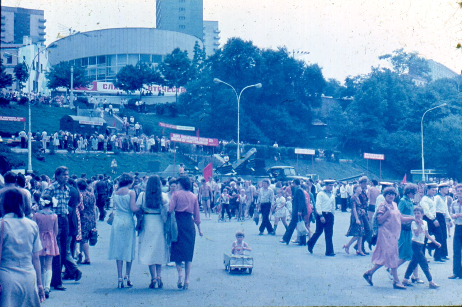 Владивосток ДЕНЬ ВМФ 1982, набережная Спортивной Гавани, выставка военной техники